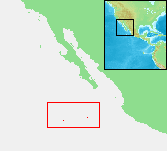 Revillagigedo Islands